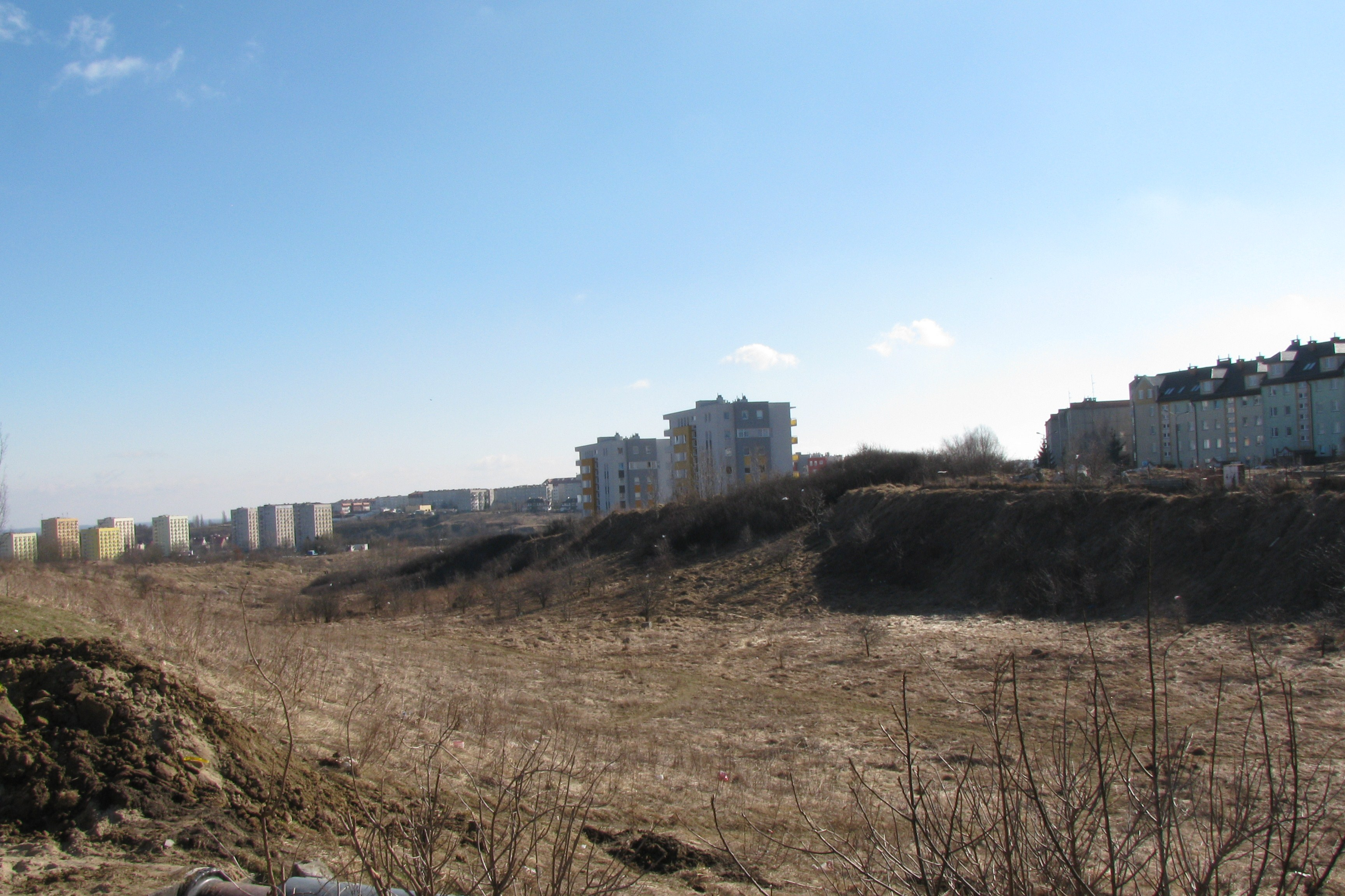 Dolina na osiedlu Gdańsk Chełm, widok w kierunku południowym.